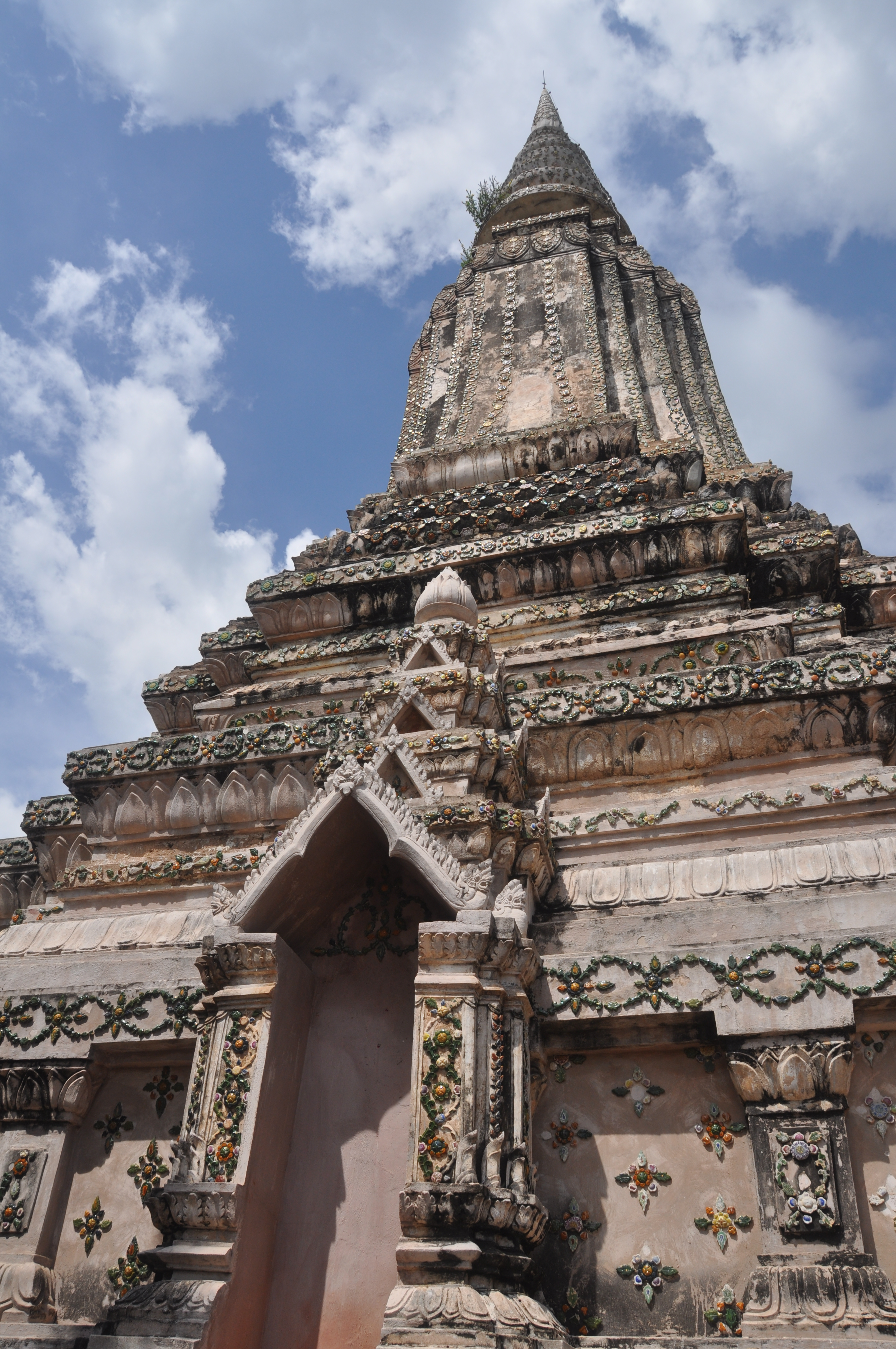 Stupa of King Ang Duong, Oudong, Cambodia